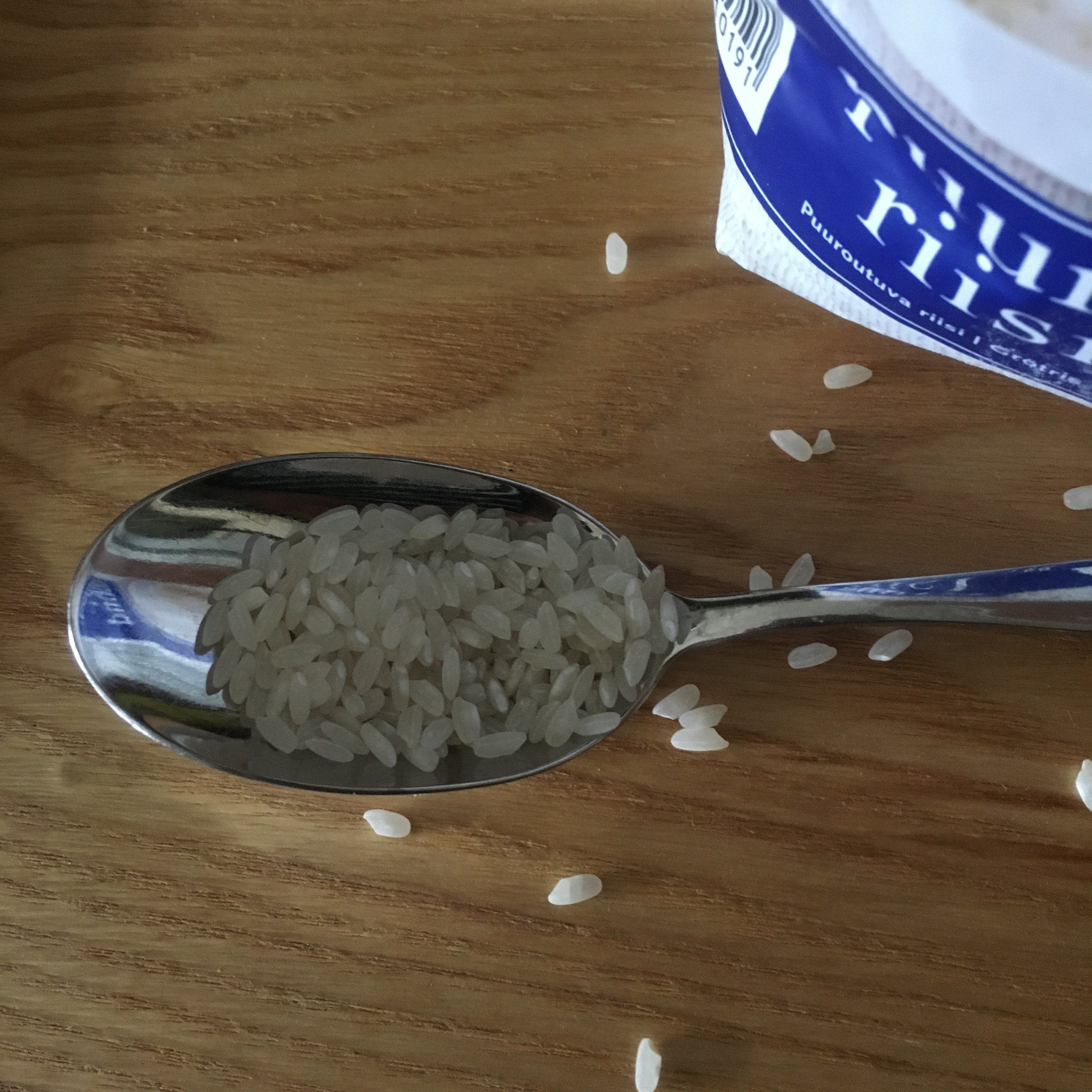 keittämätöntä puuroriisiä